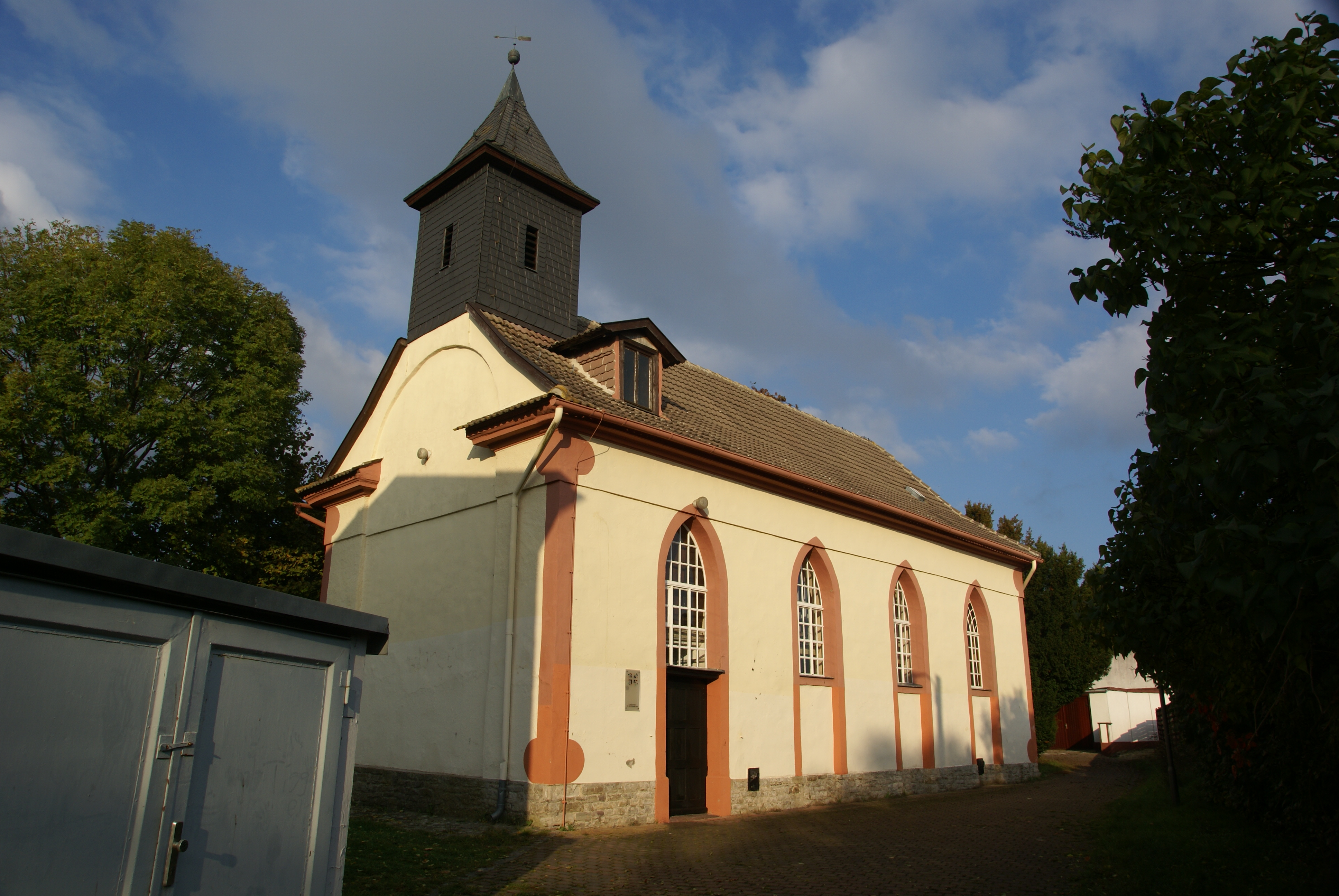 Die evangelische Dorfkirche St.Katharina in Benndorf im Landkreis Mansfeld-Südharz. Ansicht vom Süden